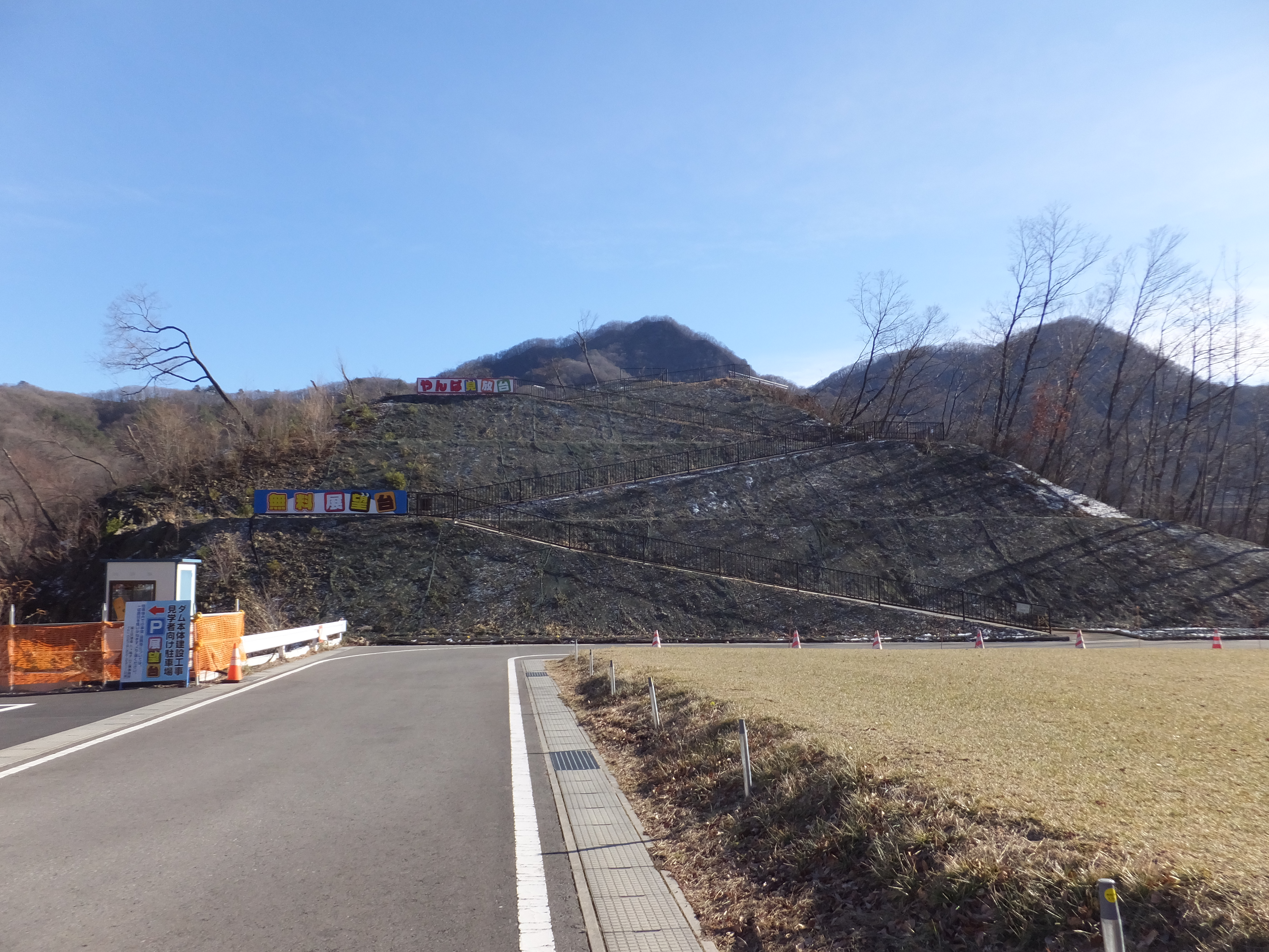 やんば見放台 2016年12月